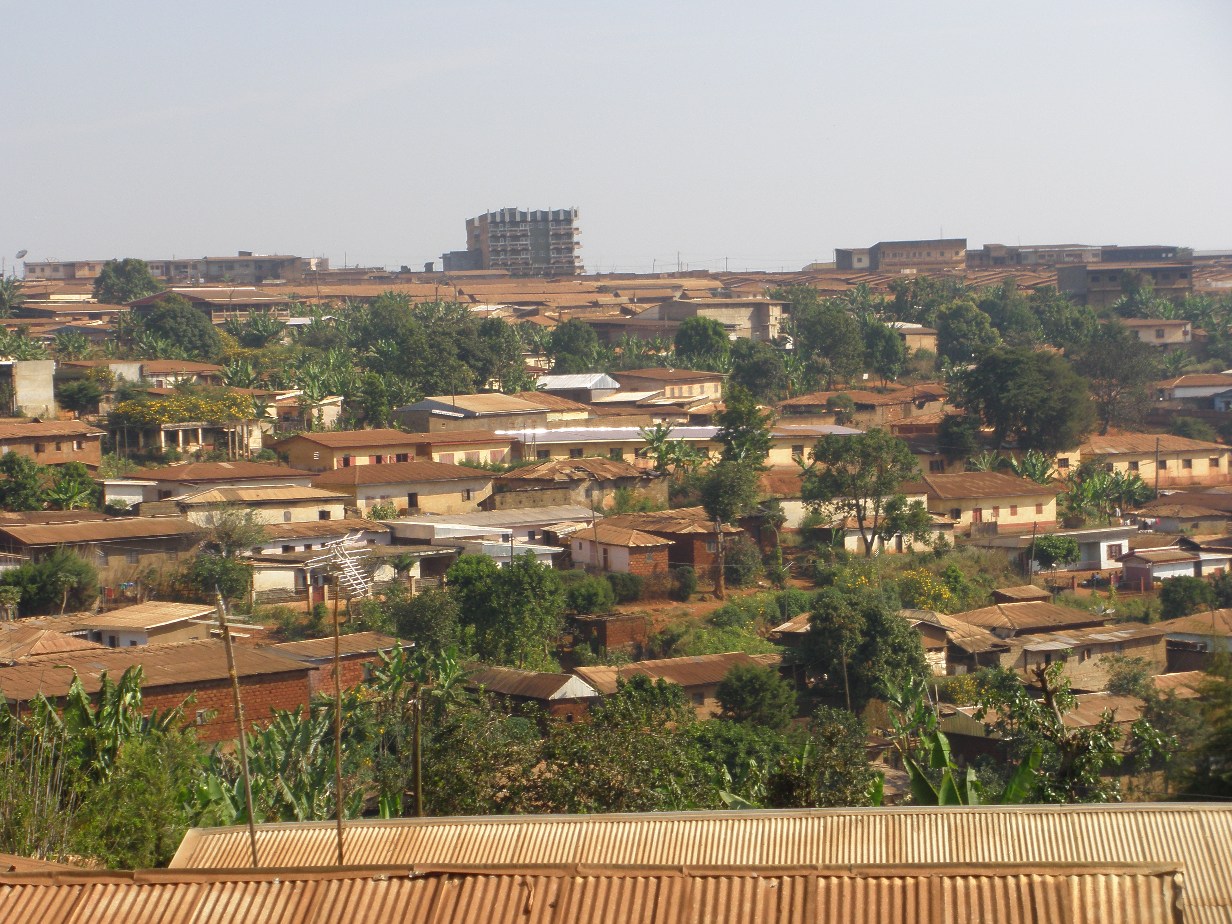 Vue sur le Centre ville de Mbouda, depuis l'ENIEG (Jules Ferry)